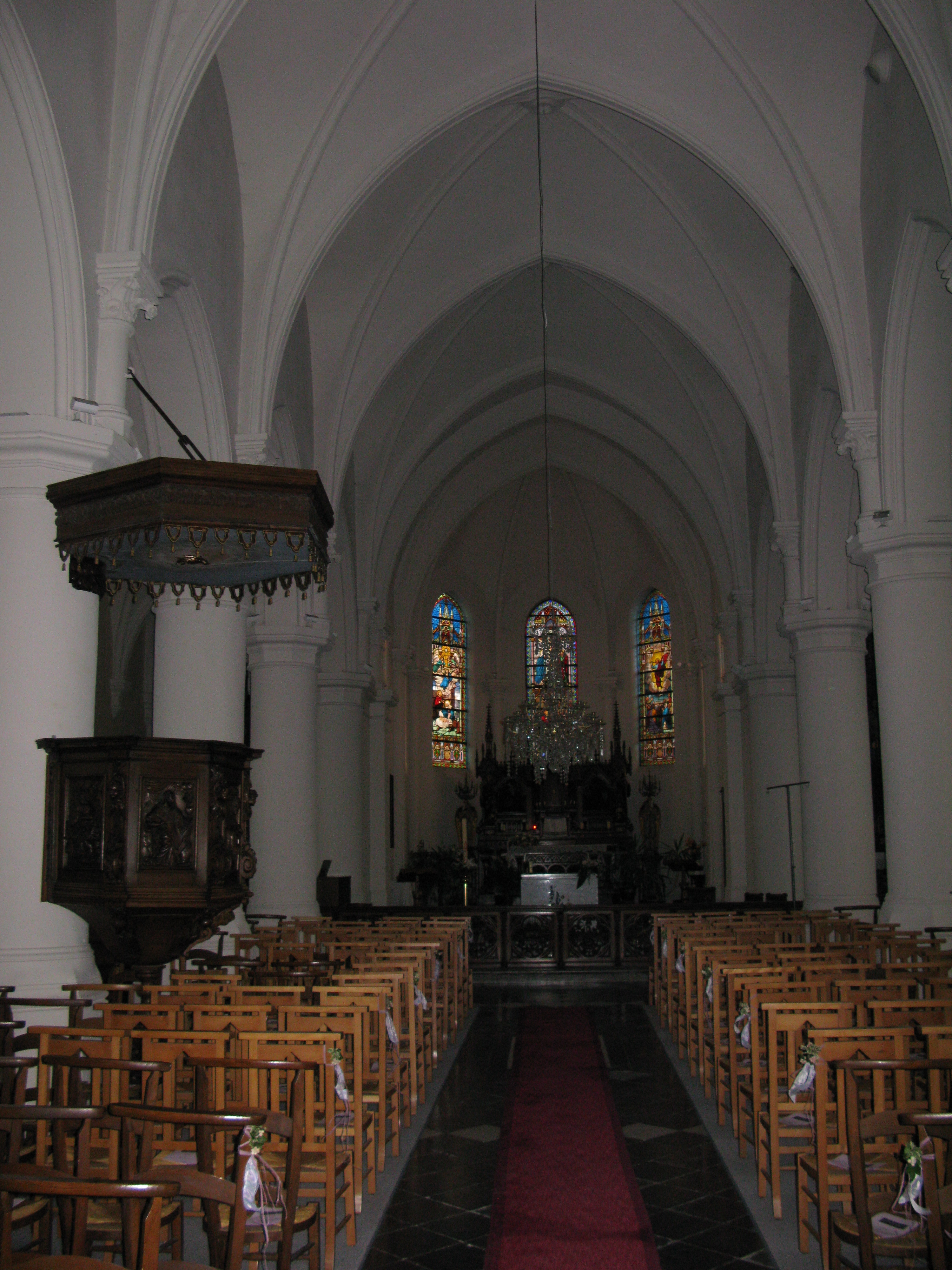 Eglise Saint-Omer de Brouckerque, intérieur, chaire, lustre, choeur, maître-autel.